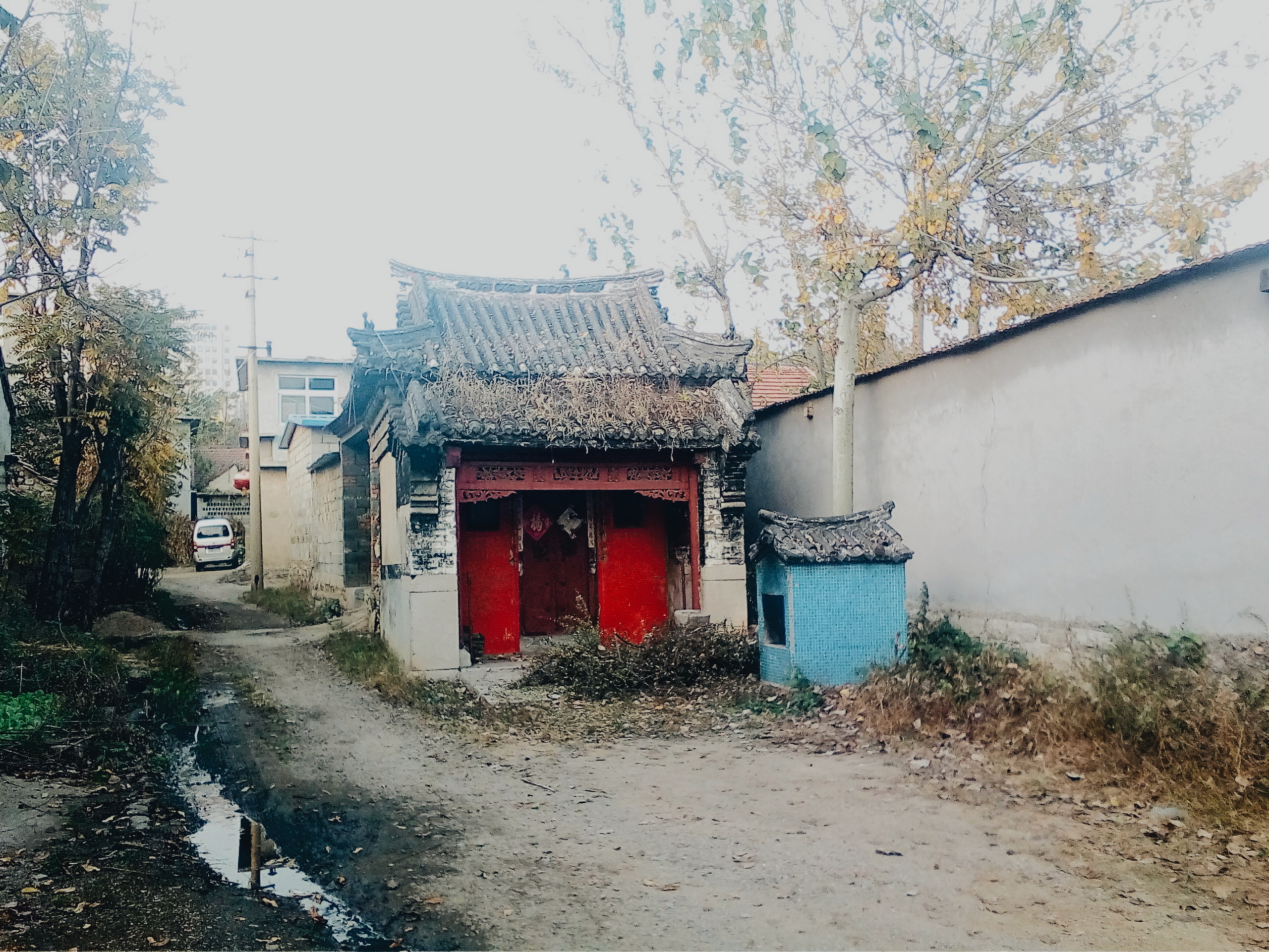 钢城区桲椤村关帝庙